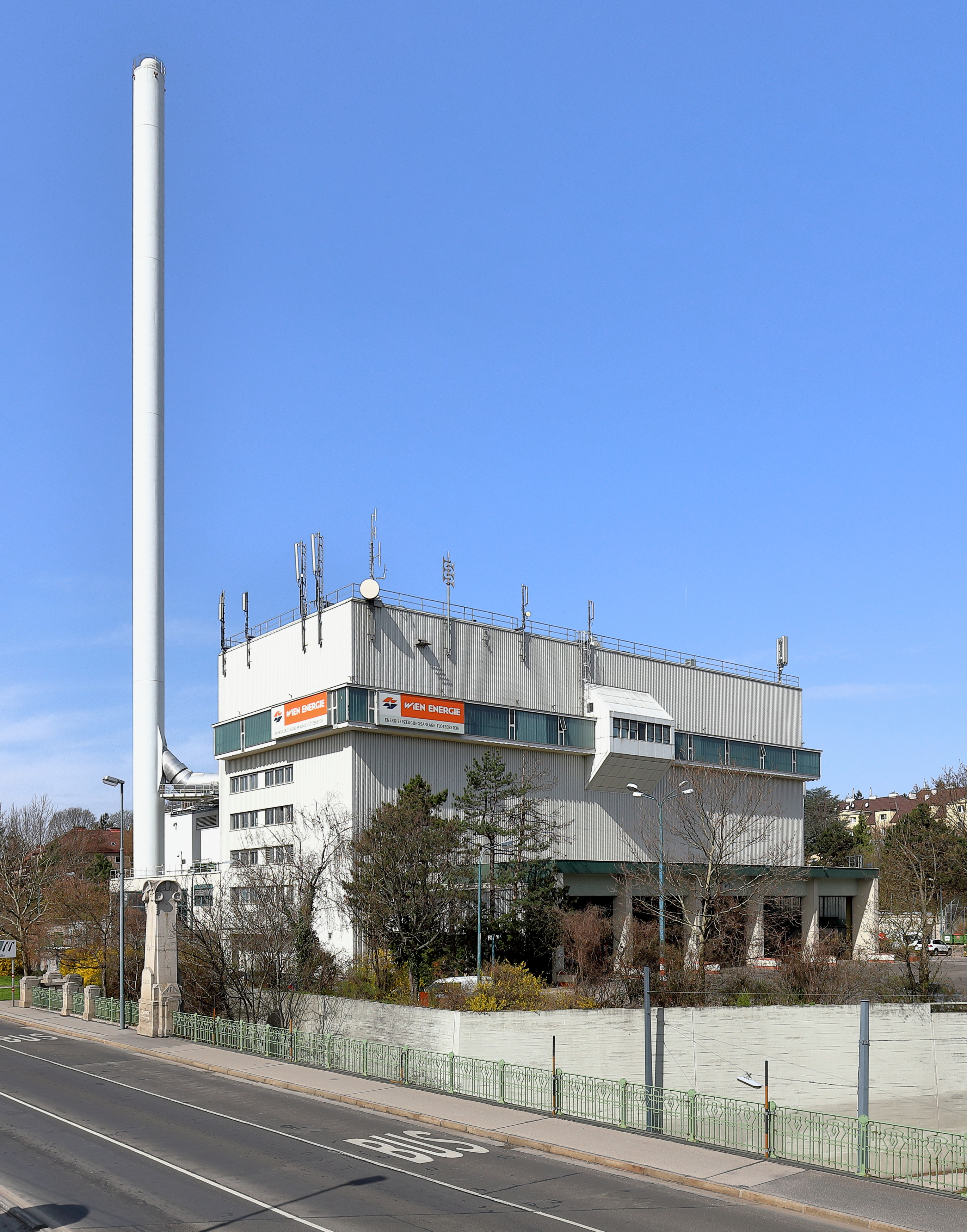 Die Müllverbrennungsanlage Flötzersteig im 16. Wiener Gemeindebezirk OttakringDie Anlage wurde ab 1960 nach Plänen von Josef Bervar von der Firma Simmering-Graz-Pauker AG errichtet und ging 1963 als erste Müllverbrennungsanlage Wiens in Betrieb. Sie verbrennt bis zu 200.000 Tonnen Restmüll pro Jahr (Stand 2018). Zwischen 1992 und 1993 wurde eine zusätzliche Filteranlagen (DeNOx-Anlage) eingebaut. In diesem Zuge wurde auch der jetzt rd. 100 Meter hohe Schlot neu errichtet.